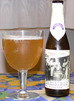 Blanche